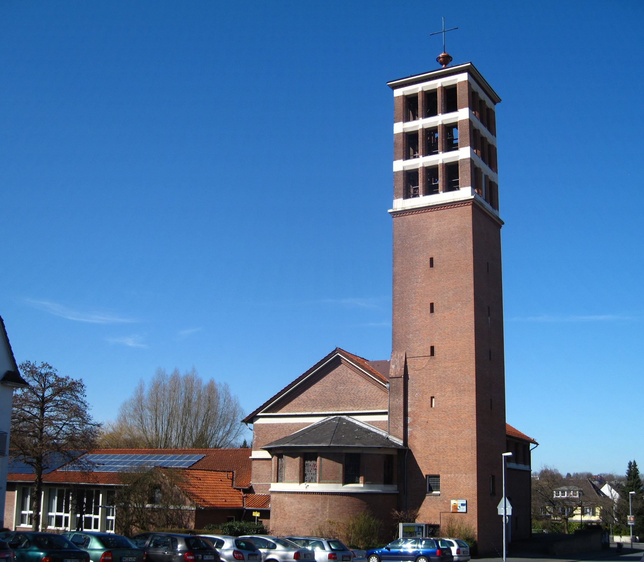 Evangelische Erlöserkirche in Iserlohn-Wermingsen, Im Wiesengrund.